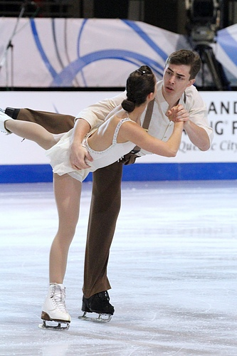 Бритни Симпсон и Мэттью Блэкмер на финале Гран-при среди юниоров сезона 2011-2012